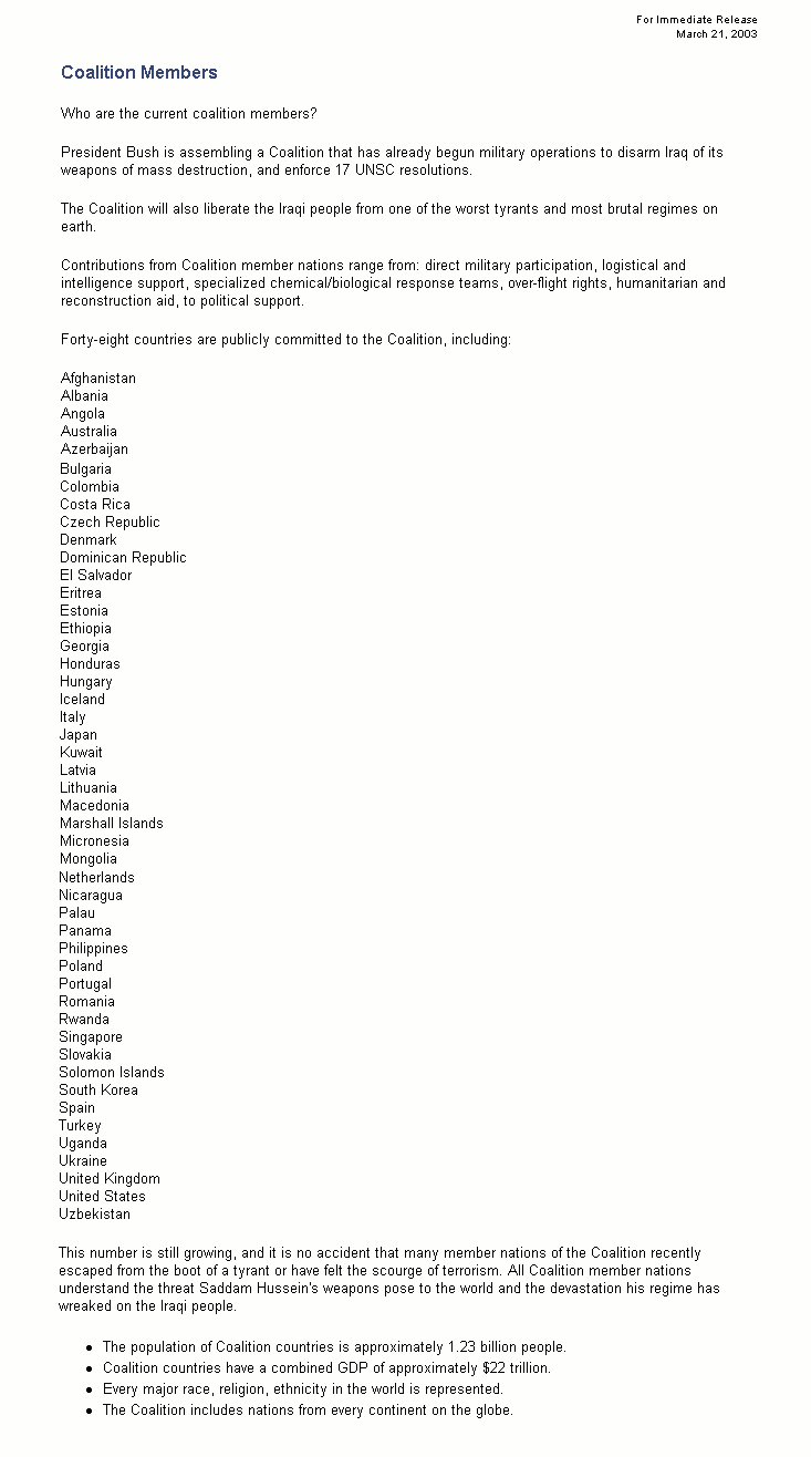 [1] Image:Original coalition.png